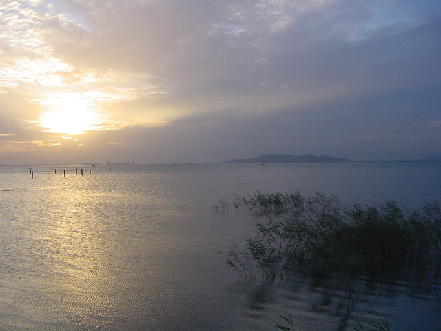 Taken by mywife and all rights have given up. 根据我夫人所言，摄影地点应该在苏州太湖旅游度假区附近。--莴苣笋【(^。^)y-.。o○】 02:26 2005年3月11日 (UTC)